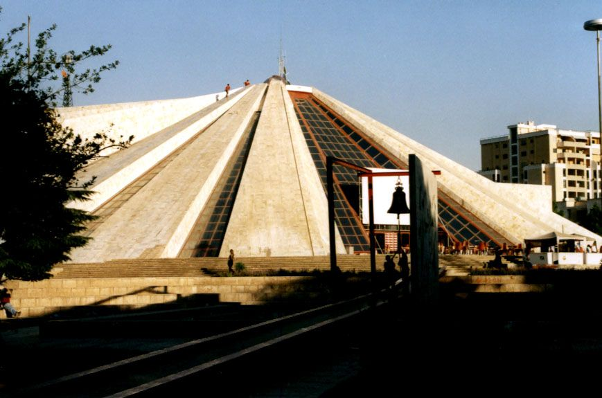 Beschreibung: Museum von Enver Hoxha in Tirana / Albanien Quelle: Fotografiert im September 2000 Quelle: selbst erstellt Fotograf: Stefan Kühn Mausoleum